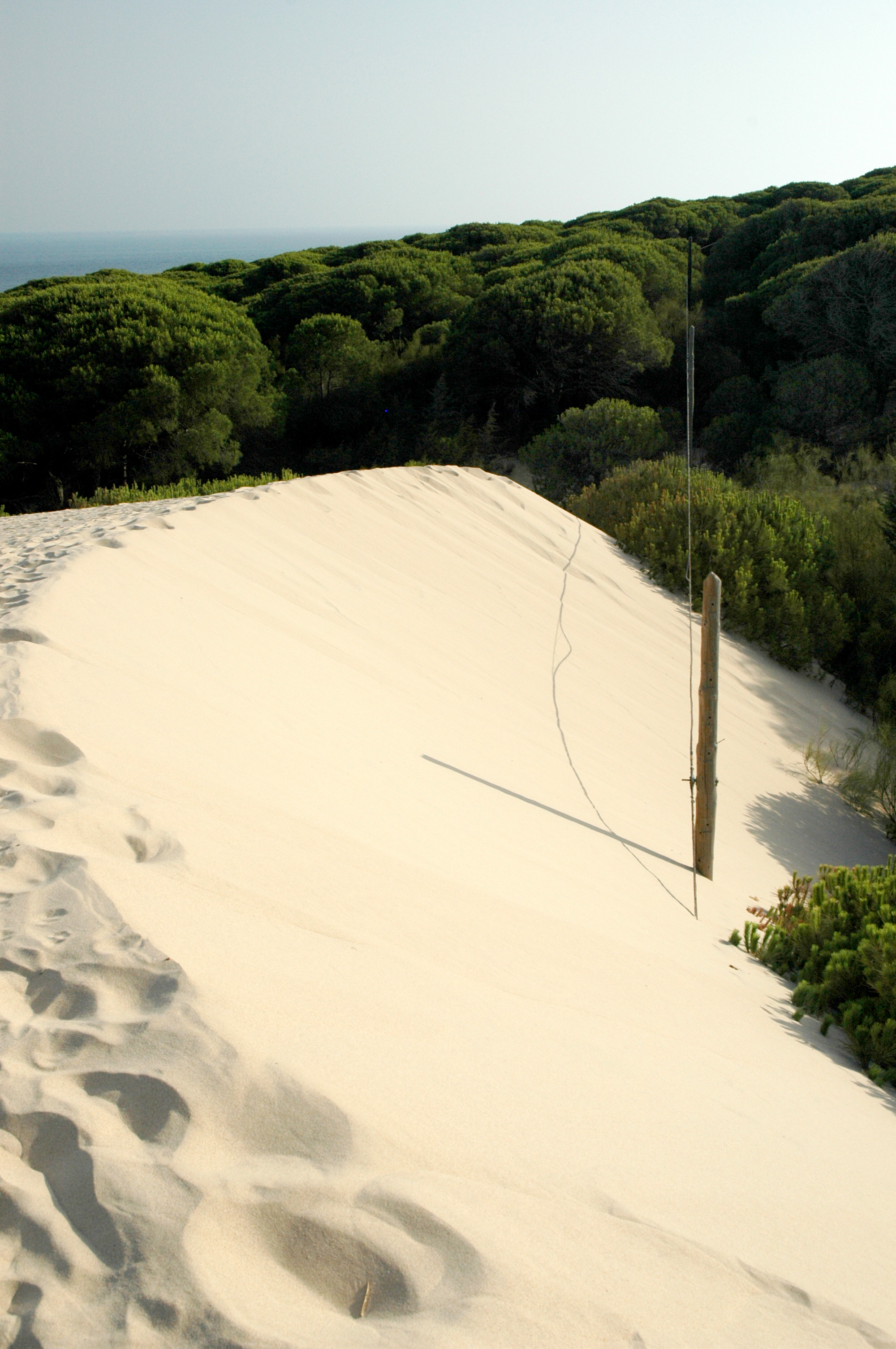 Gran Duna Playa de Tarifa (Cádiz, Spain)